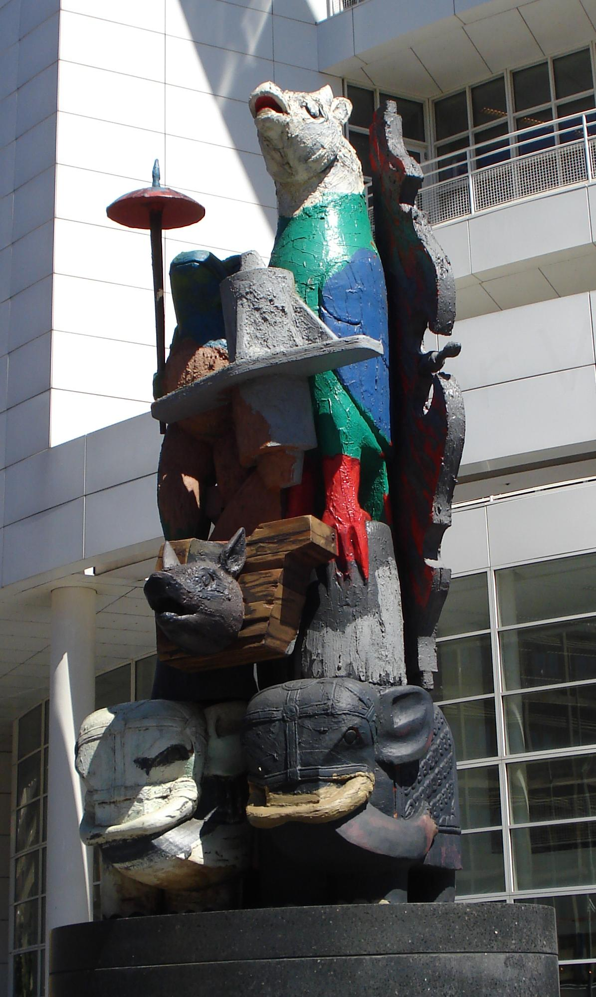 Den Haag, centrum. Kunstroute Sokkelplan. Kunstwerk "Frog with umbrella" van Karel Appel. Den Haag/The Netherlands.